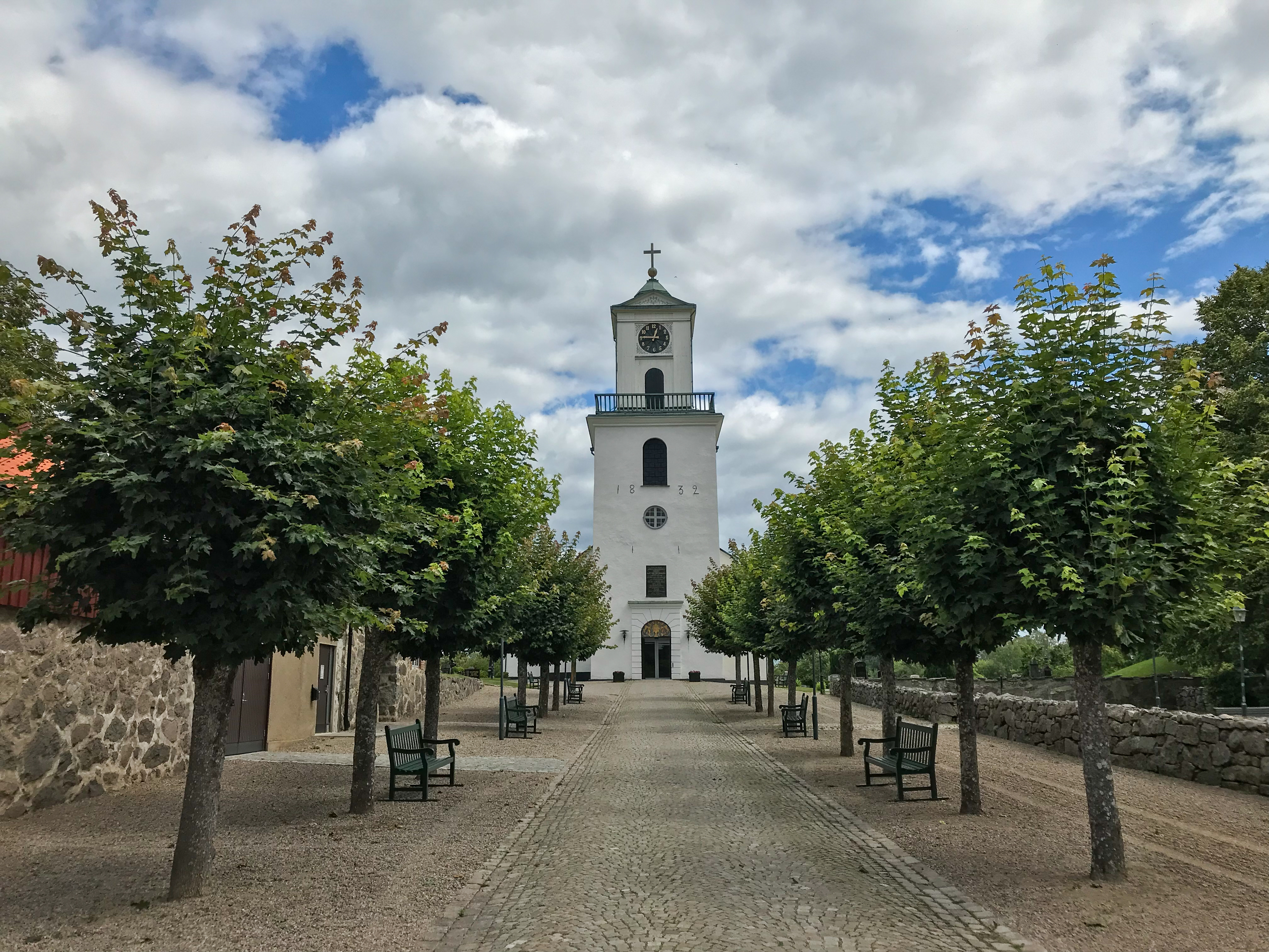 Frontalansicht und Zuwegung zur Kirche in Jämshög (Gemeinde Olofström)